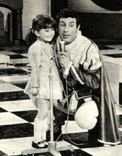 Cino Tortorella, presentatore italiano, nei panni del Mago Zurlì, con Barbara Ferigo, vincitrice dell'edizione del Festival dello Zecchino d'Oro con la canzone "Quarantaquattro gatti" Fonte: rivista del 1968.